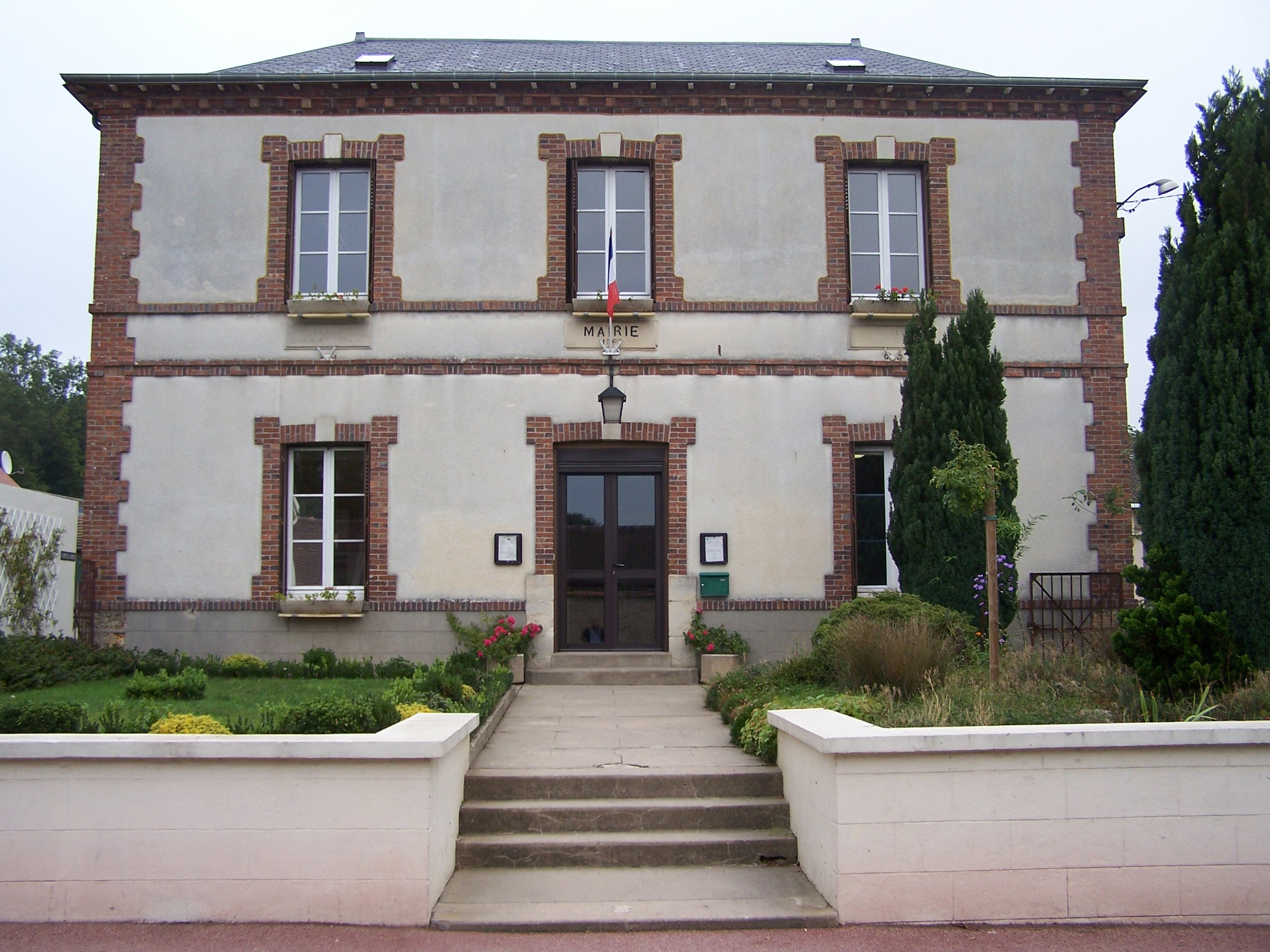 Mairie de Bullion (Yvelines, France)